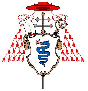 Stemma cardinalizio della famiglia Visconti di Milano